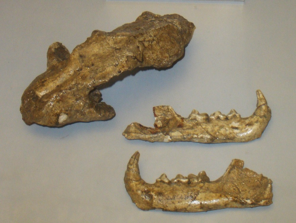 Fossil of Lynx, an extinct mammal- Took the picture at Museo di Paleontologia di Firenze